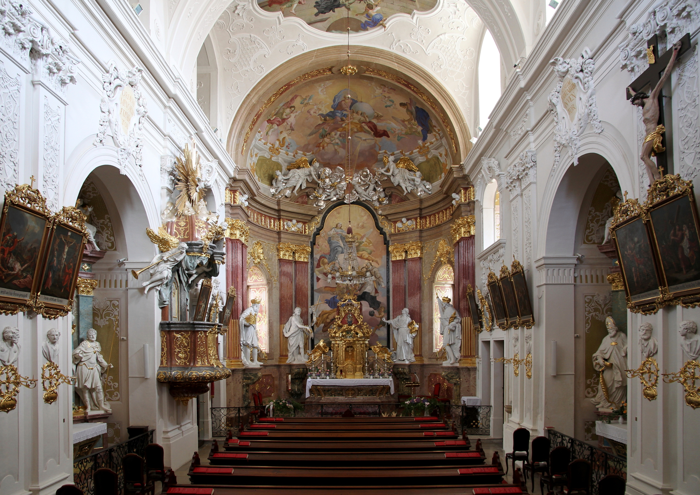 Langhaus und Chor der ehemaligen Klosterkirche hl. Johannes Nepomuk in der niederösterreichischen Stadt Tulln an der Donau.